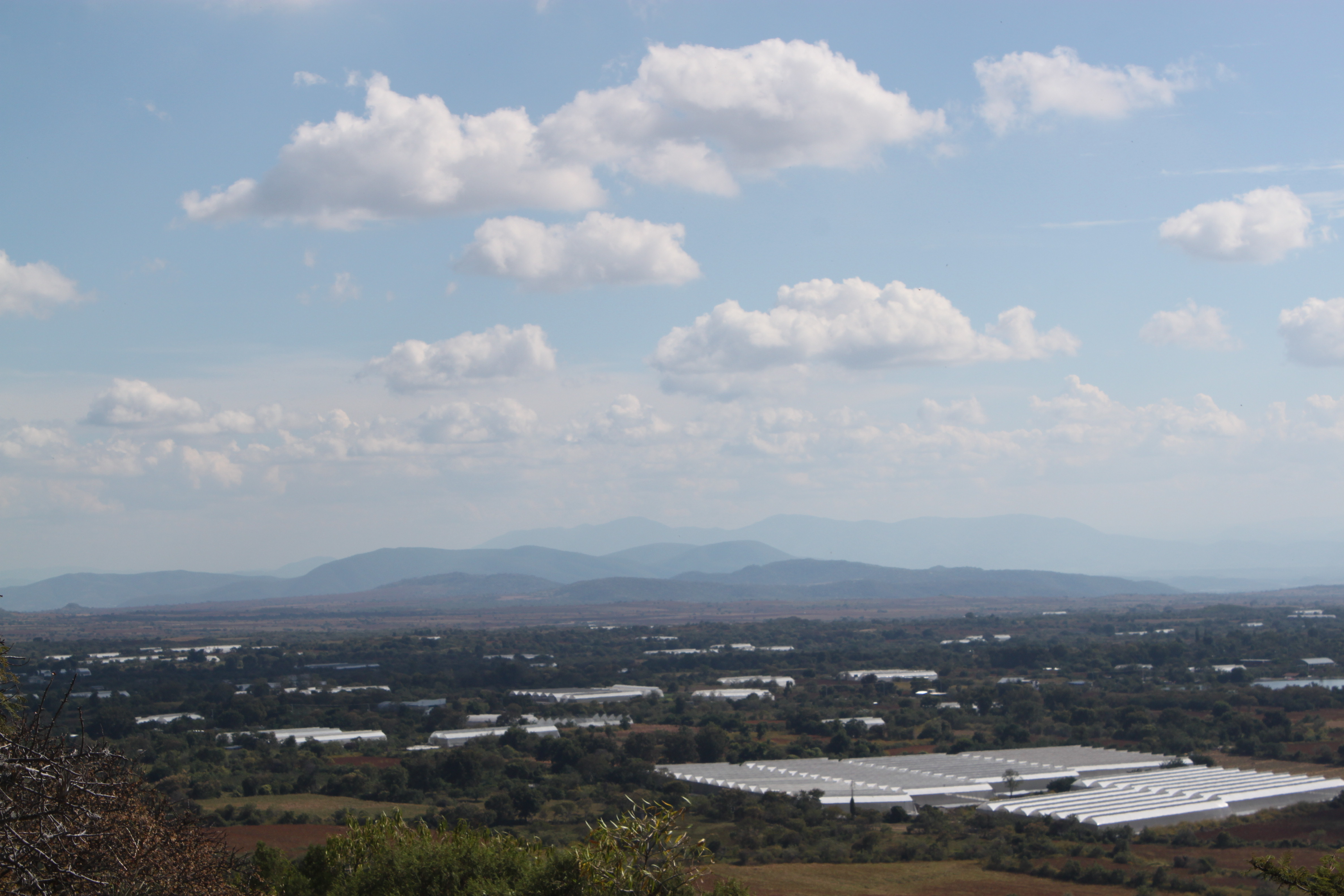 Invernaderos en Tlacotepec, Morelos, México.